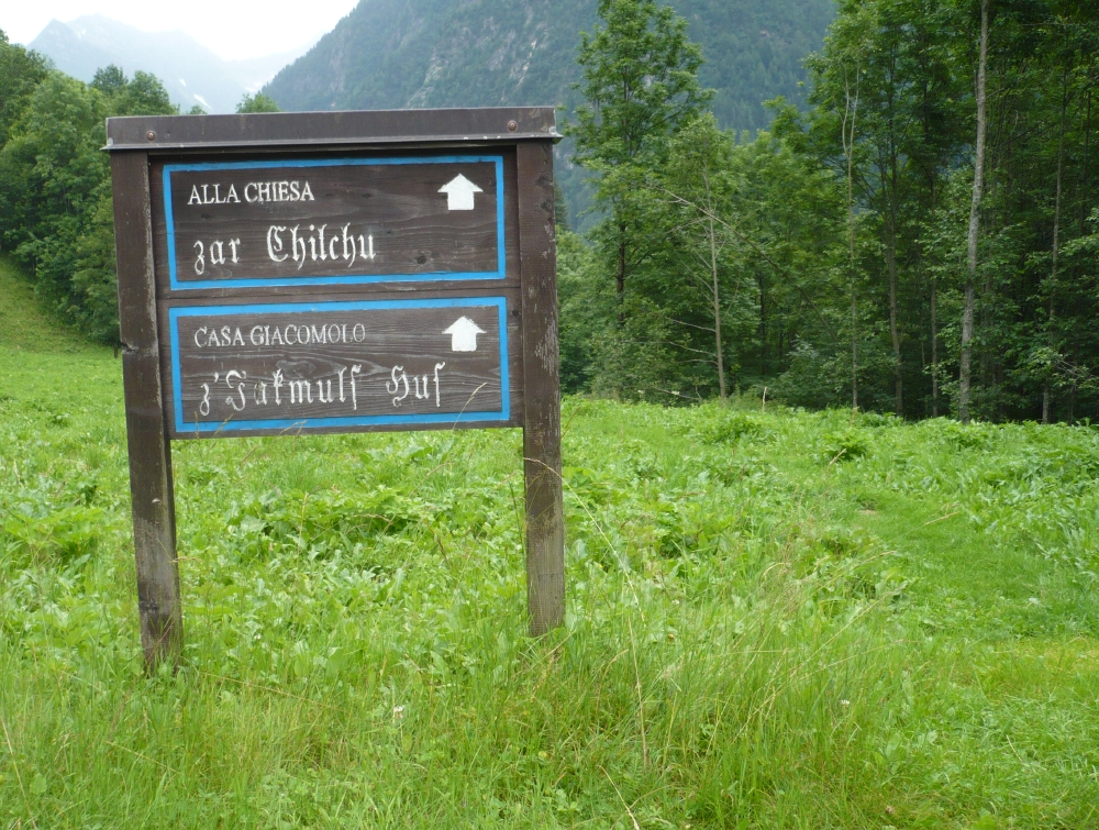 zweisprachiger Wergweiser in Alagna